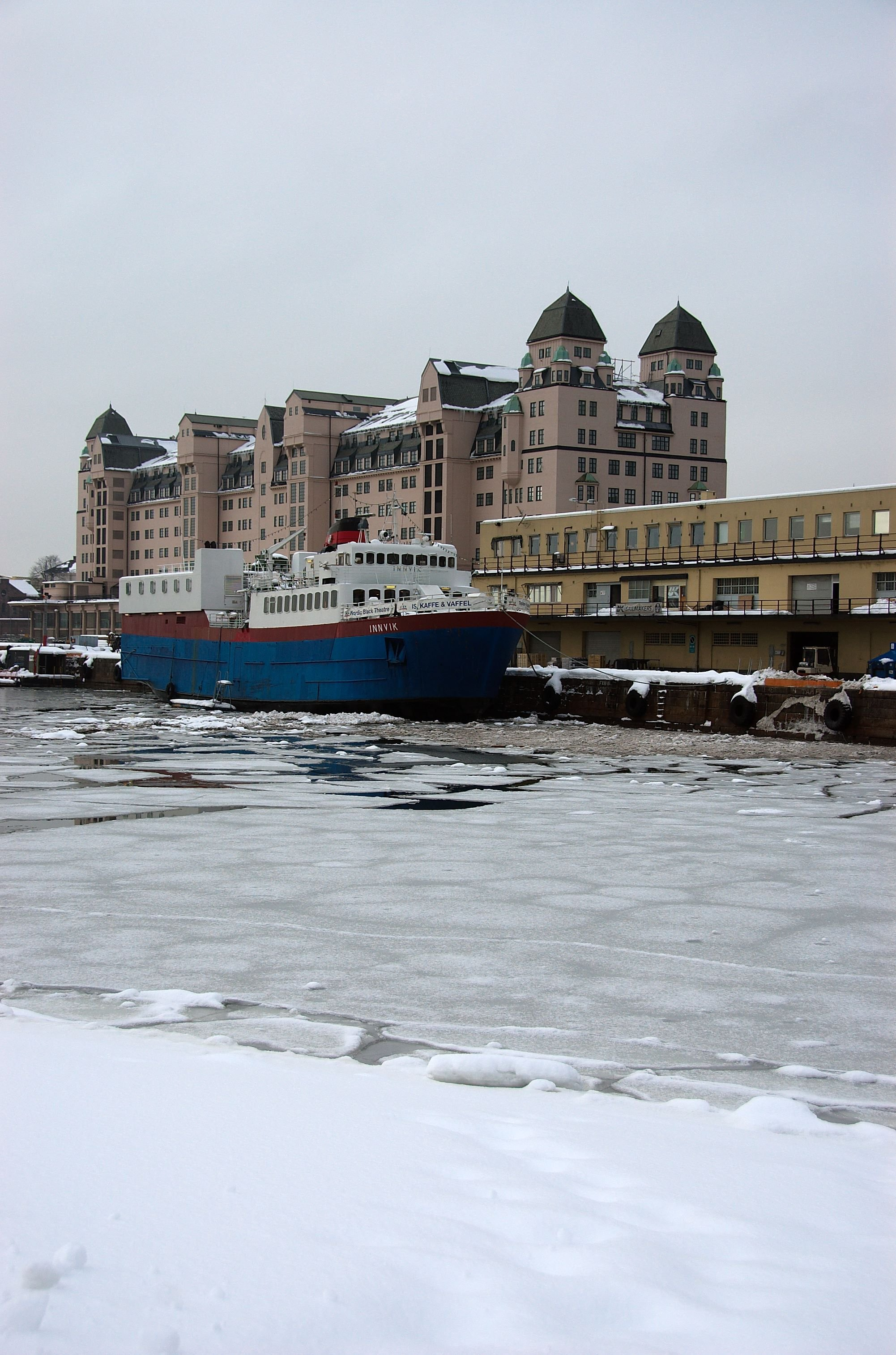 Teaterbåten M/S Innvik foran Havnelageret i Bjørvika, Oslo. M/S Innvik ble kjøpt av Nordic Black Theatre i 2001 og er en kombinert teaterbåt og bed & breakfast.